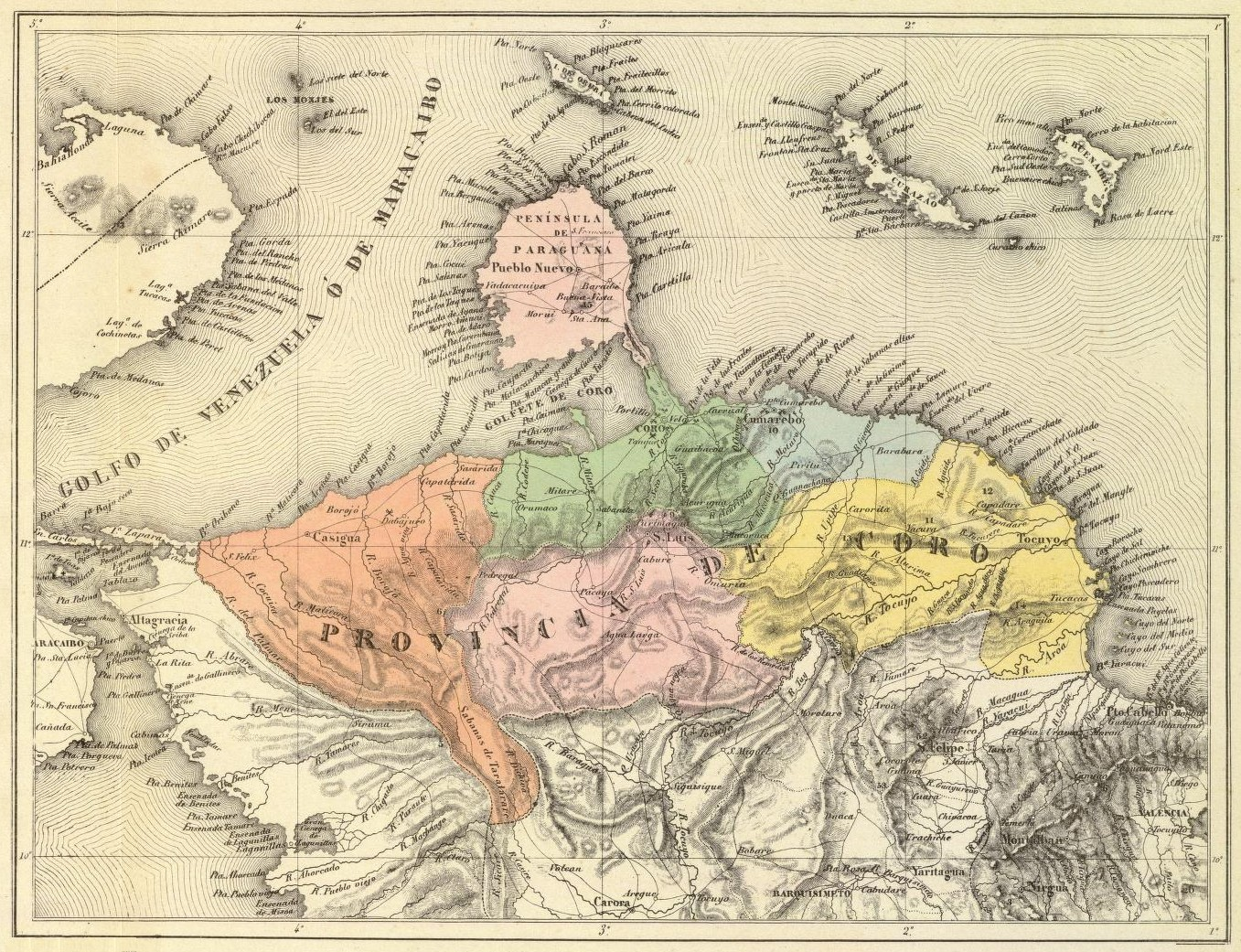 Provincia de Coro. Tomado del "Atlas físico y político de la República de Venezuela", 1840.